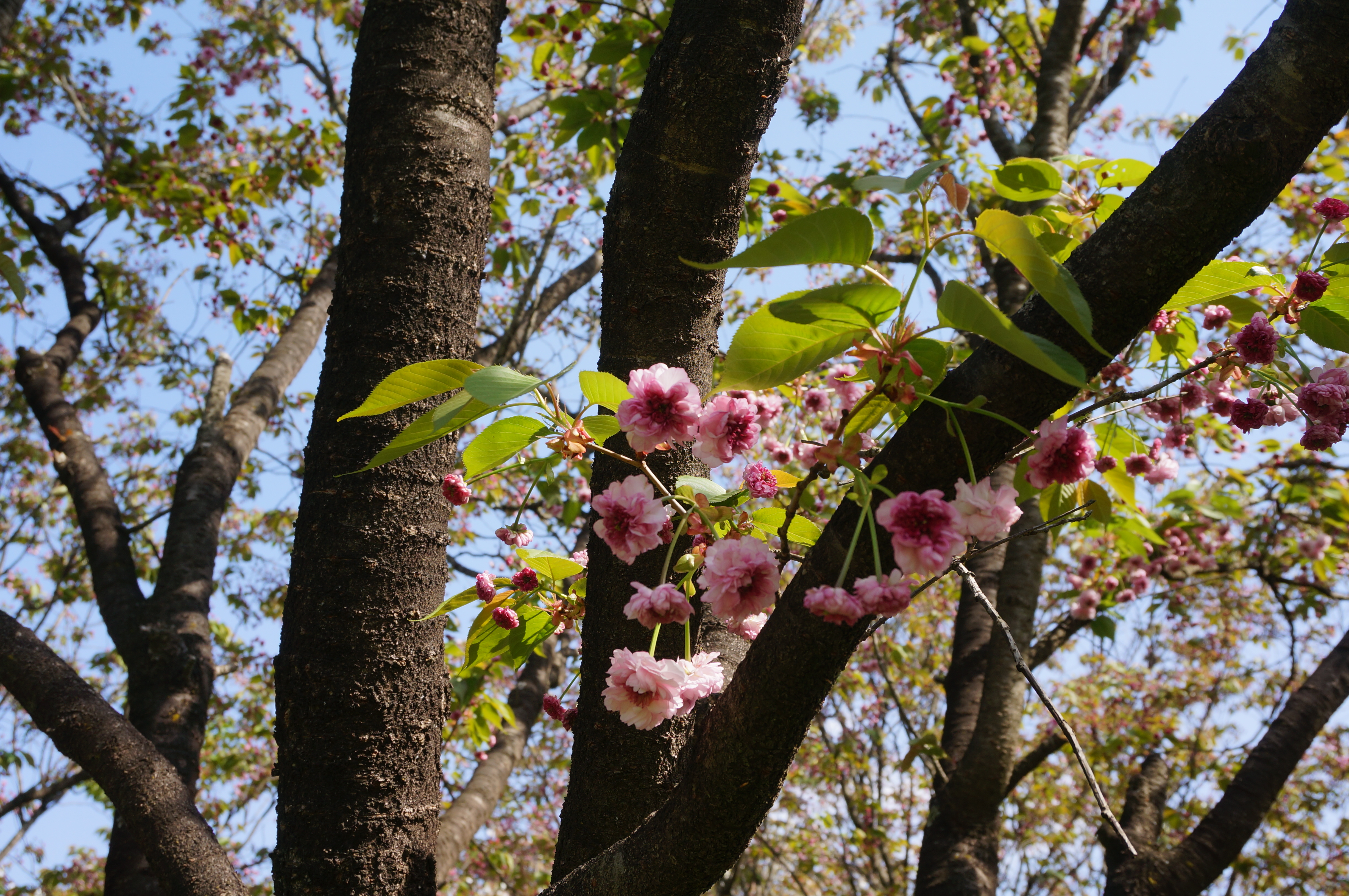 日本花の会結城農場さくら見本園にて